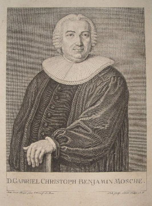 D. Gabriel Christoph Benjamin Mosche, Kupferstich ca. 17x16cm von Johann Gottfried Saiter nach einem Gemälde von Johann Daniel Bager (Wiesbaden 1743 - 1815 Frankfurt am Main) um 1780